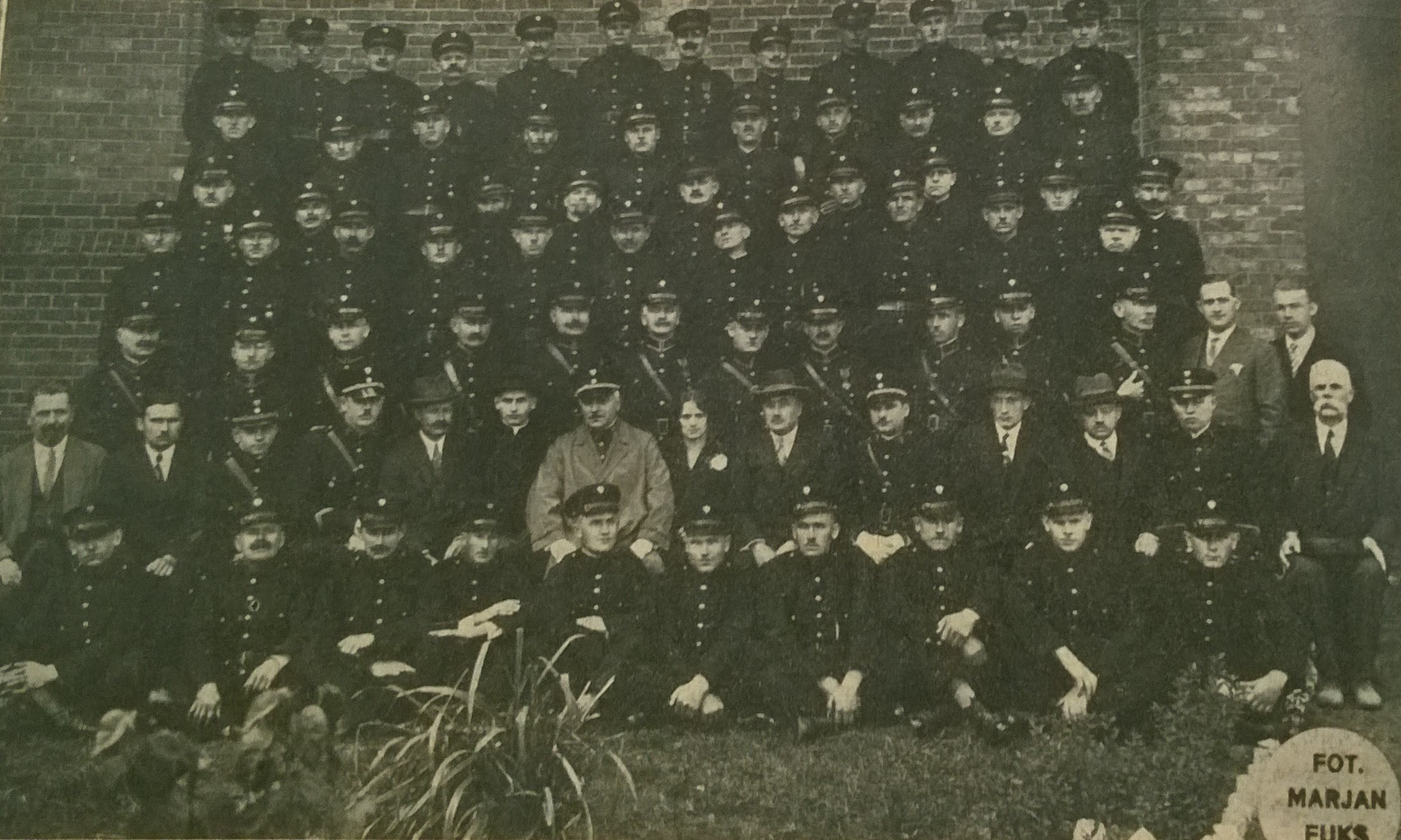 Personel wiezienia przy Rakowieckiej w Warszawie, ok. 1925 r.